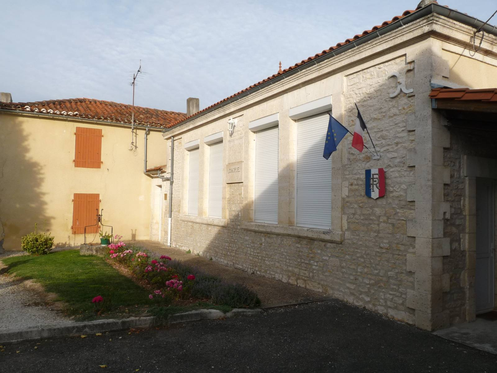 mairie de LA Tâche, Charente, France